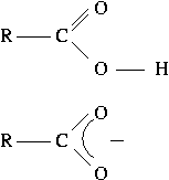 carbonzuur